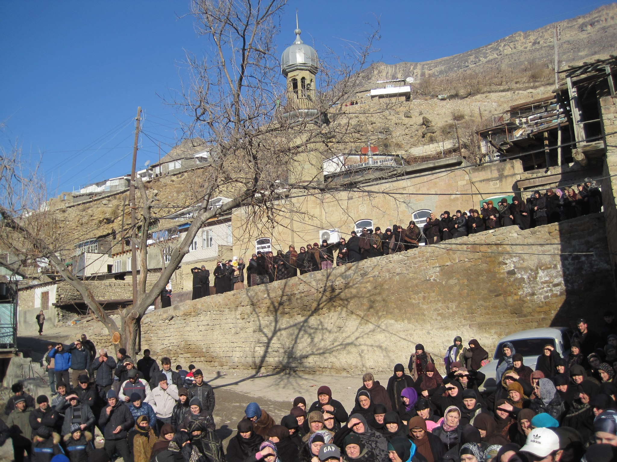 Митинг с требованием прекращения режима КТО. Гимры, 14 январь 2013 года